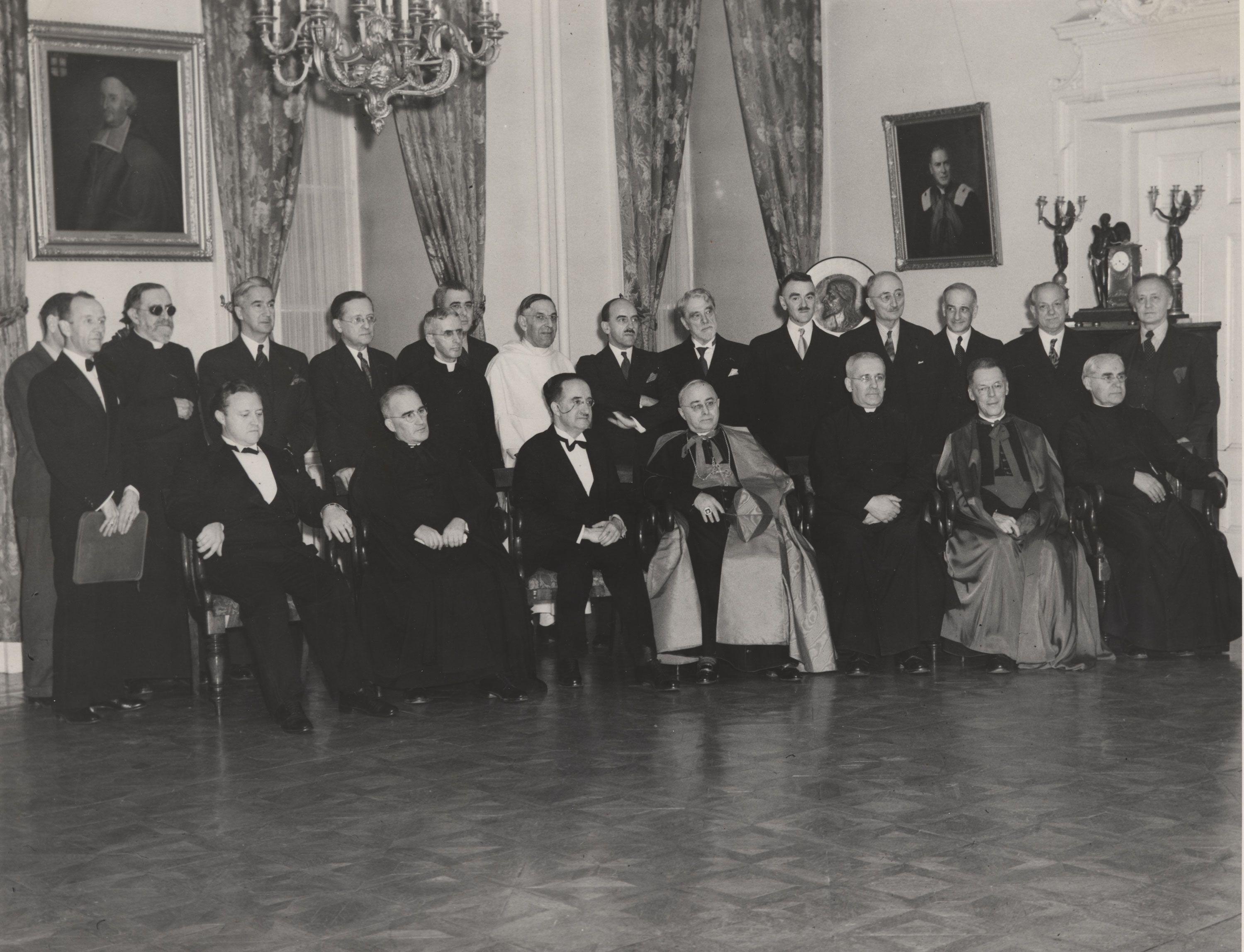 Séance de la section française de la Société royale du Canada, Québec, 18 novembre 1945. Première rangée : Charles de Koninck, Mgr Félix-Antoine Savard, Séraphin Marion, Mgr Jean-Marie-Rodrigue Villeneuve, Maurice Laliberté, Olivier Maurault, p.s.s., et Georges Simard, o.m.i. Deuxième rangée : Jean-Marie Gauvreau, Élie Auclair, Maurice Hébert, Léopold Houlé, Georges Robitaille, Harry Bernard, Thomas-Marie Lamarche, o.p., Jean Bruchési, Cyrille Delage, Eugène L’Heureux, Donatien Frémont, Claude Melançon, Arthur Saint-Pierre et Marius Barbeau. Photo : Roger Bédard. Université d’Ottawa, CRCCF, Fonds Séraphin-Marion (P106), Ph152-B-6.